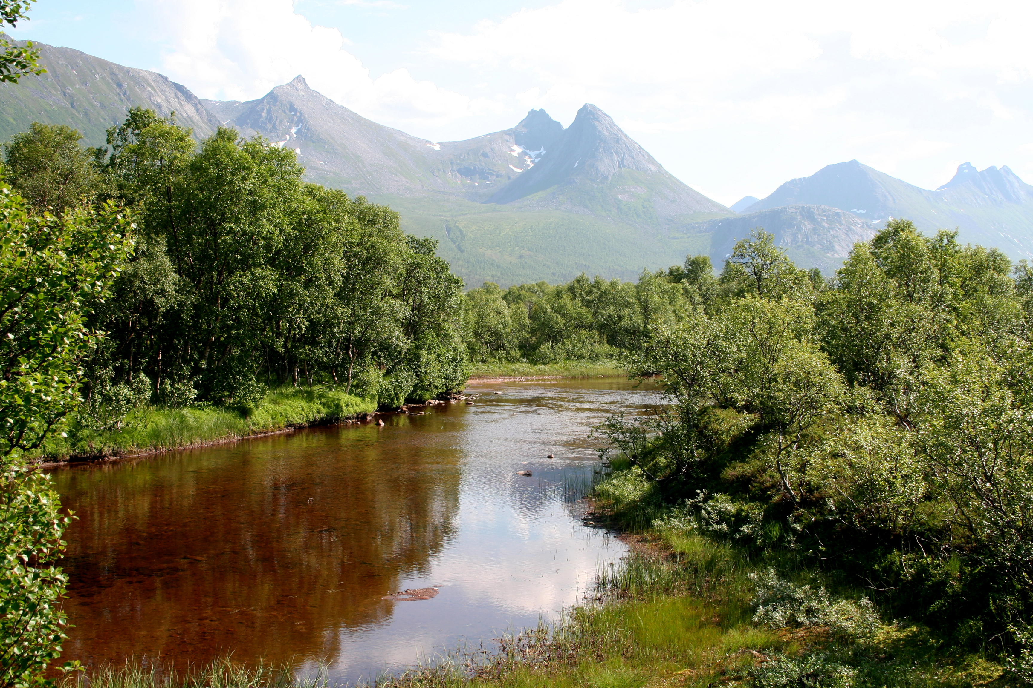 Forfjordelva river at Forfjord in Andøy and Sortland municipalities, Norway